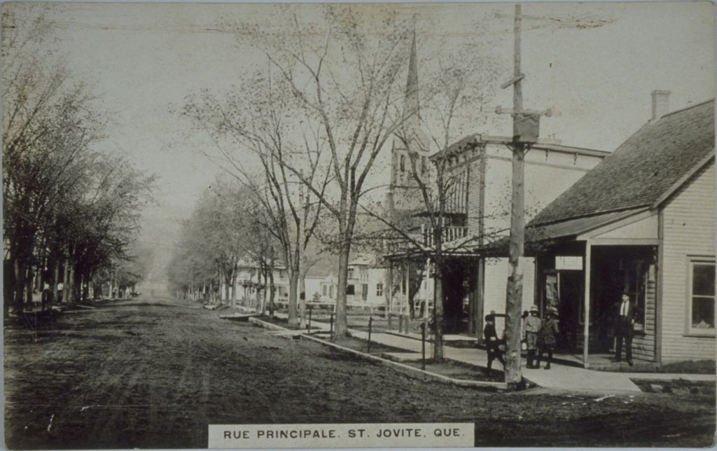 Rue Principale, St. Jovite, Que., carte postale, éditeur non identifié